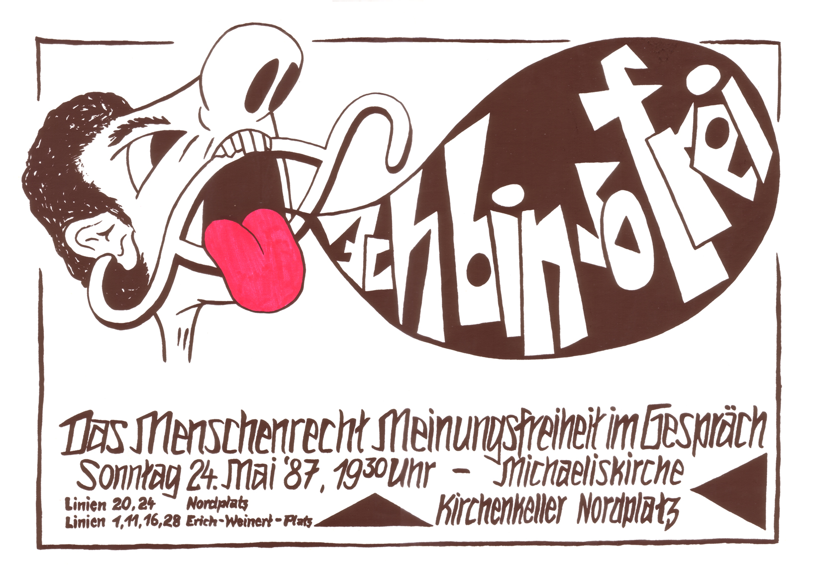 Plakat der Arbeitsgruppe Menschenrechte Leipzig zur Veranstaltung "Ich bin so frei ... - Das Menschenrecht auf Meinungsfreiheit im Gespräch". Gestaltung von Oliver Kloss; Druck von Christoph Wonneberger und Oliver Kloss im Siebdruck-Verfahren.